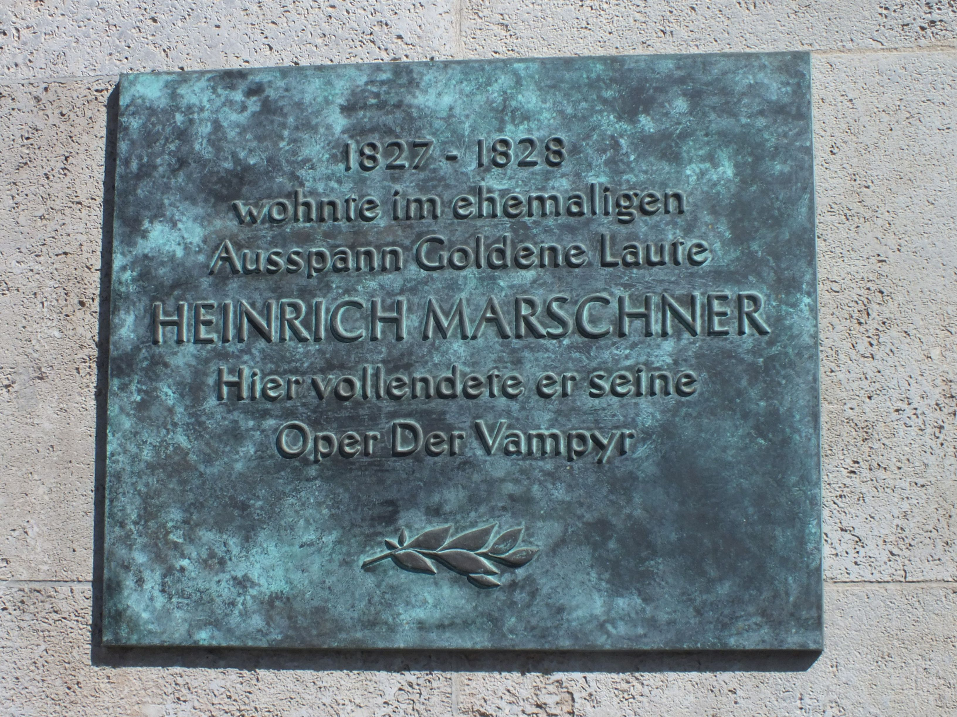 Gedenktafel am Haus Ranstädter Steinweg 8 an den Aufenthalt Heinrich Marschners in der Goldenen Laute in Leipzig